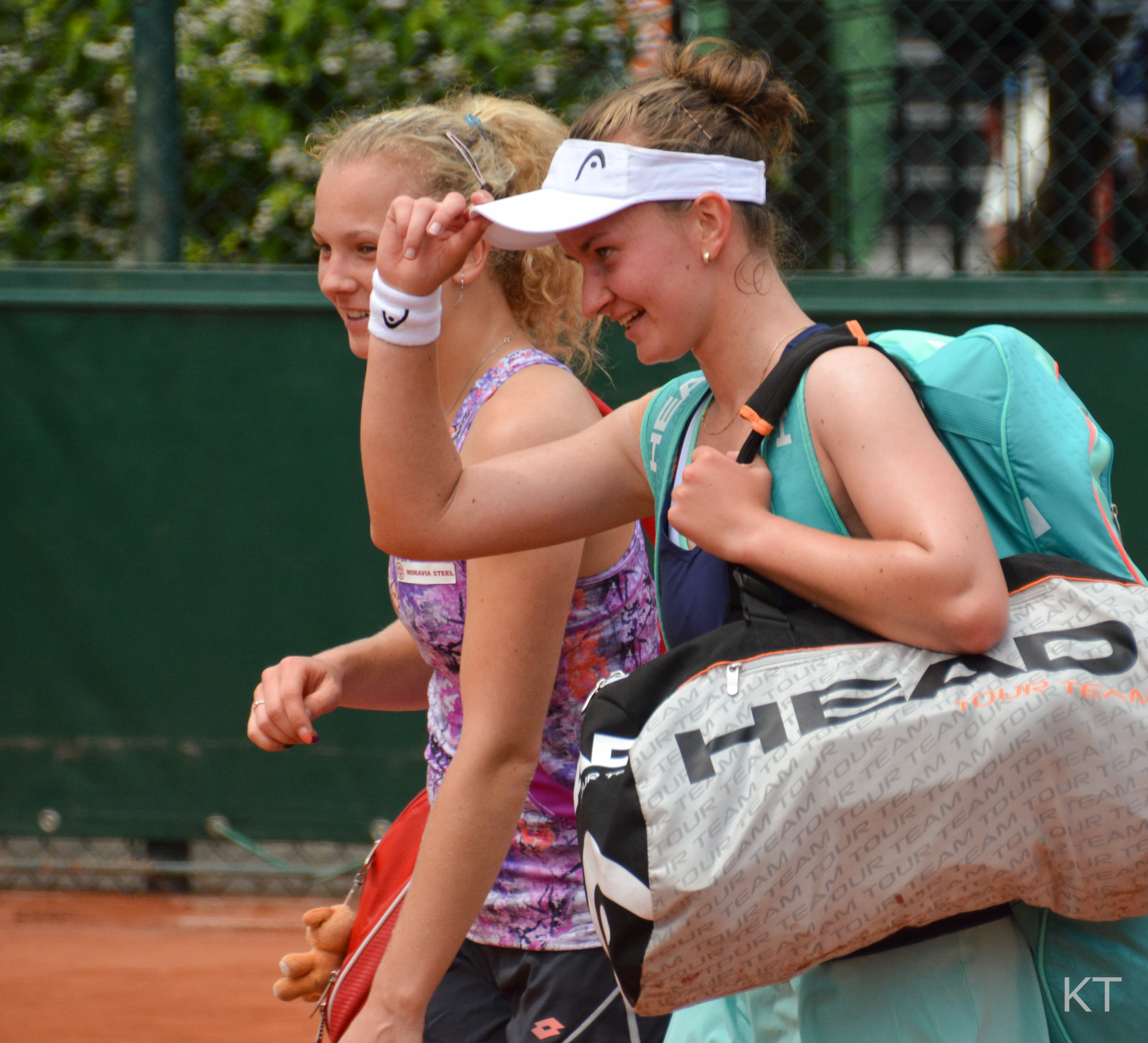 Kateřina Siniaková (left) & Barbora Krejčíková (right)